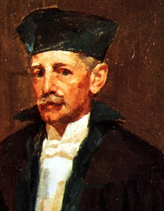 Der Architekt Richard Müller (1877—1930) auf einem Gemälde von Ferdinand Dorsch. Ausschnitt